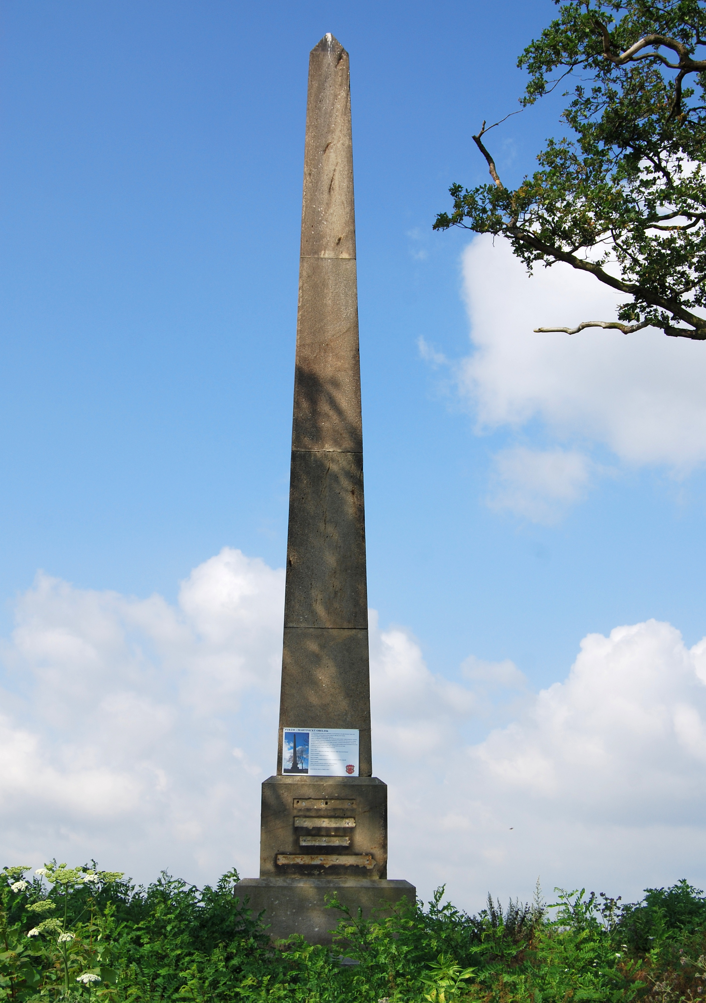 Kamenný Martinický obelisk - Pyrám - v polích mezi Kačicemi a Smečnem. Okres Kladno. Česká republika.